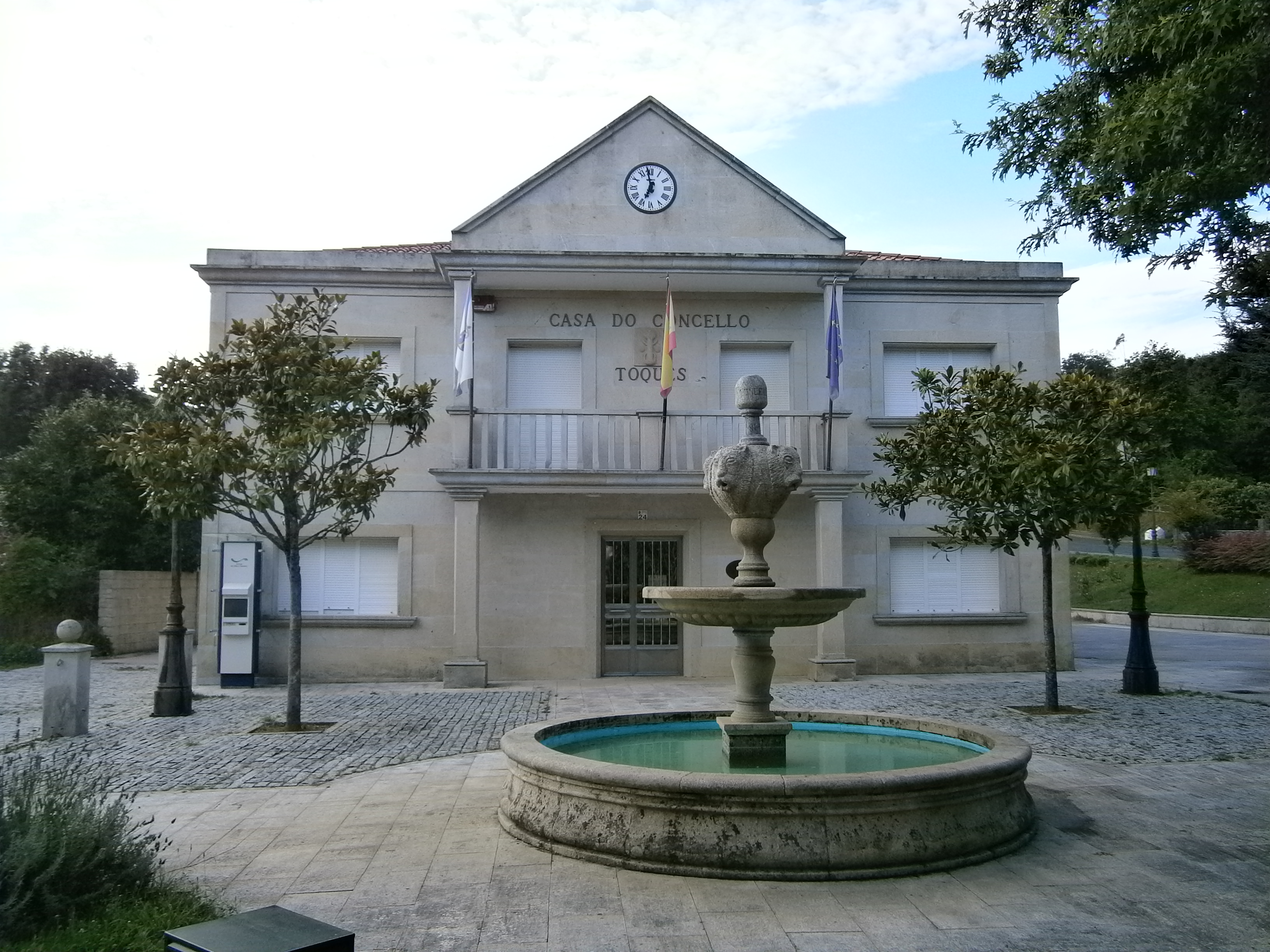 Casa do concello de Toques (A Coruña)